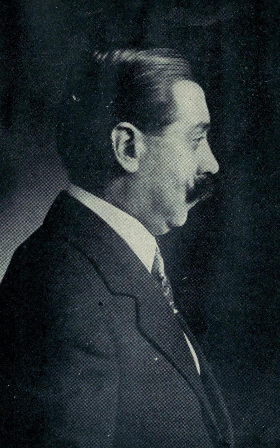 Nathanael Yáñez Silva (1884-1965)